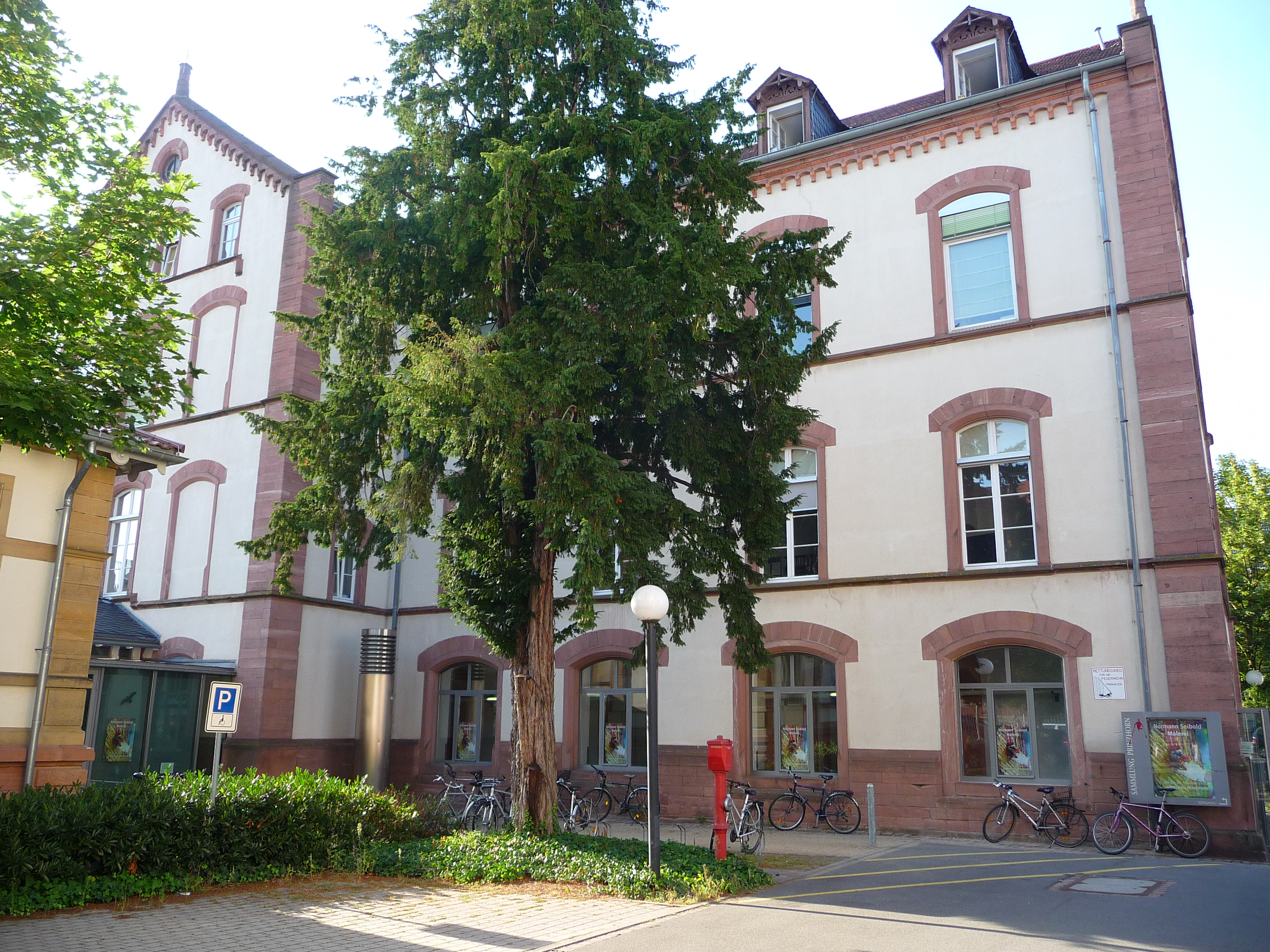 Haupteingang zur "Sammlung Prinzhorn" im Bereich des Altklinikums der Universitätsklinik Heidelberg im Stadtteil Bergheim in Heidelberg. Benannt ist die Sammlung nach dem Kunsthistoriker und Arzt Hans Prinzhorn, der in den Jahren 1919 bis 1921 als Assistent der Heidelberger Psychiatrischen Universitätsklinik die psychiatrischen Anstalten des In- und Auslands um bildnerische Werke von Patienten bat. Die Sammlung umfasst ca. 5.000 Werke.